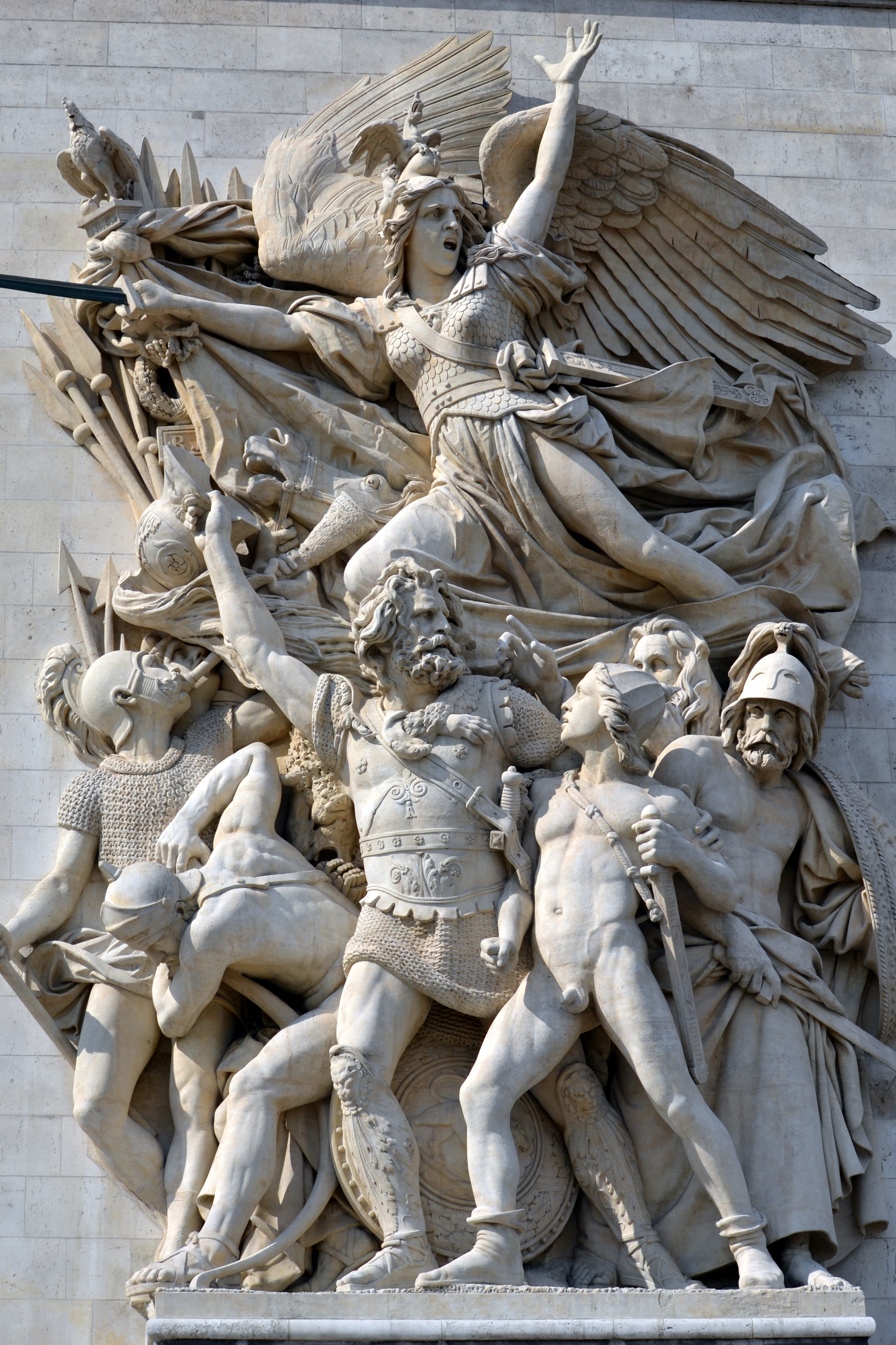 Deze foto is gemaakt tijdens een weekendje weg in Parijs (Frankrijk). This picture was taken during a weekend in Paris (France).